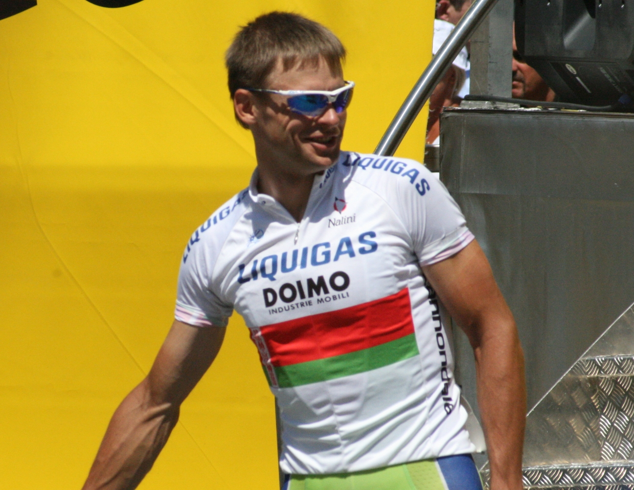 Départ de la 4e étape du Tour de France 2010 à Cambrai - Aleksandr Kuschynski